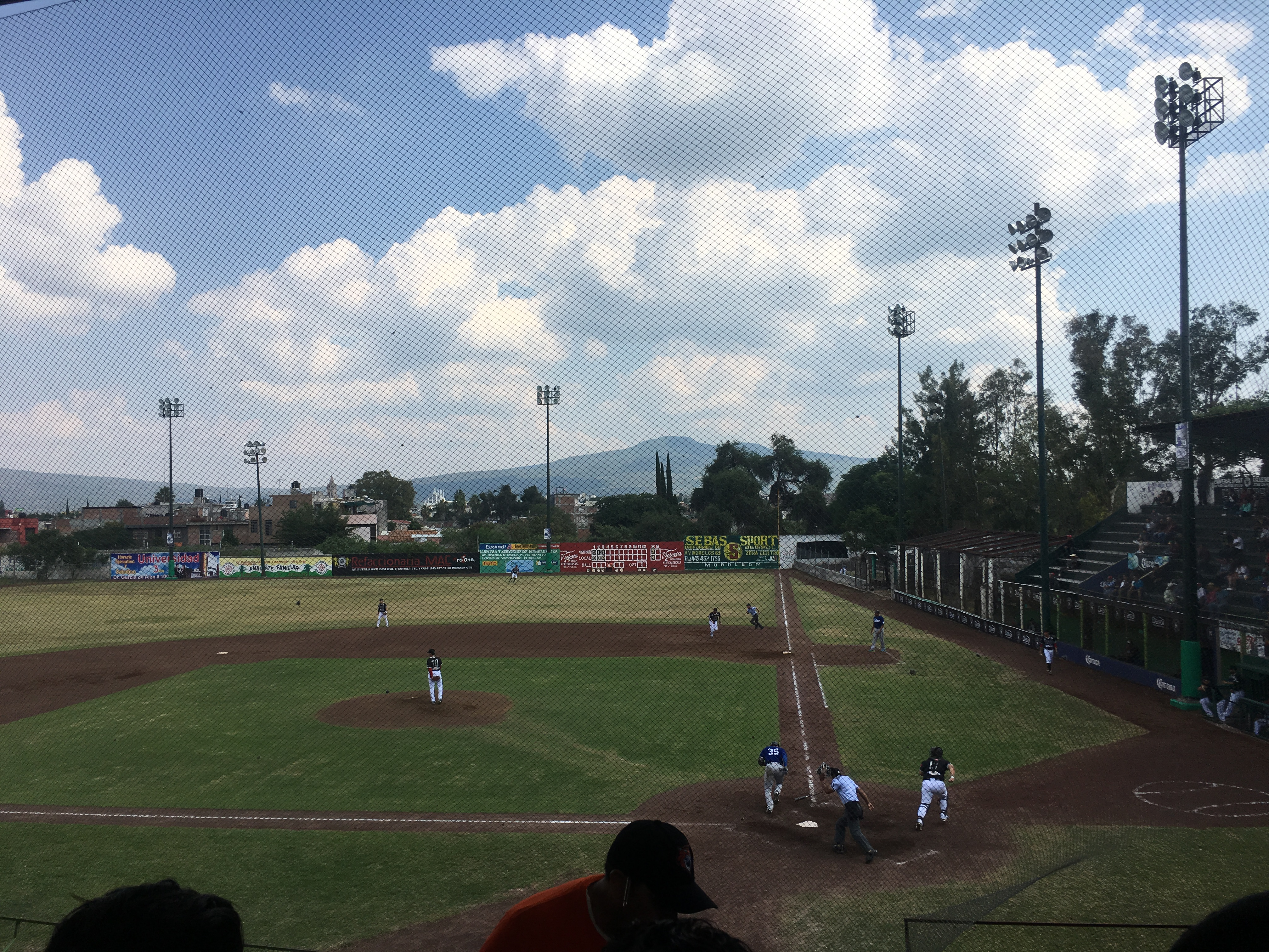 Interior